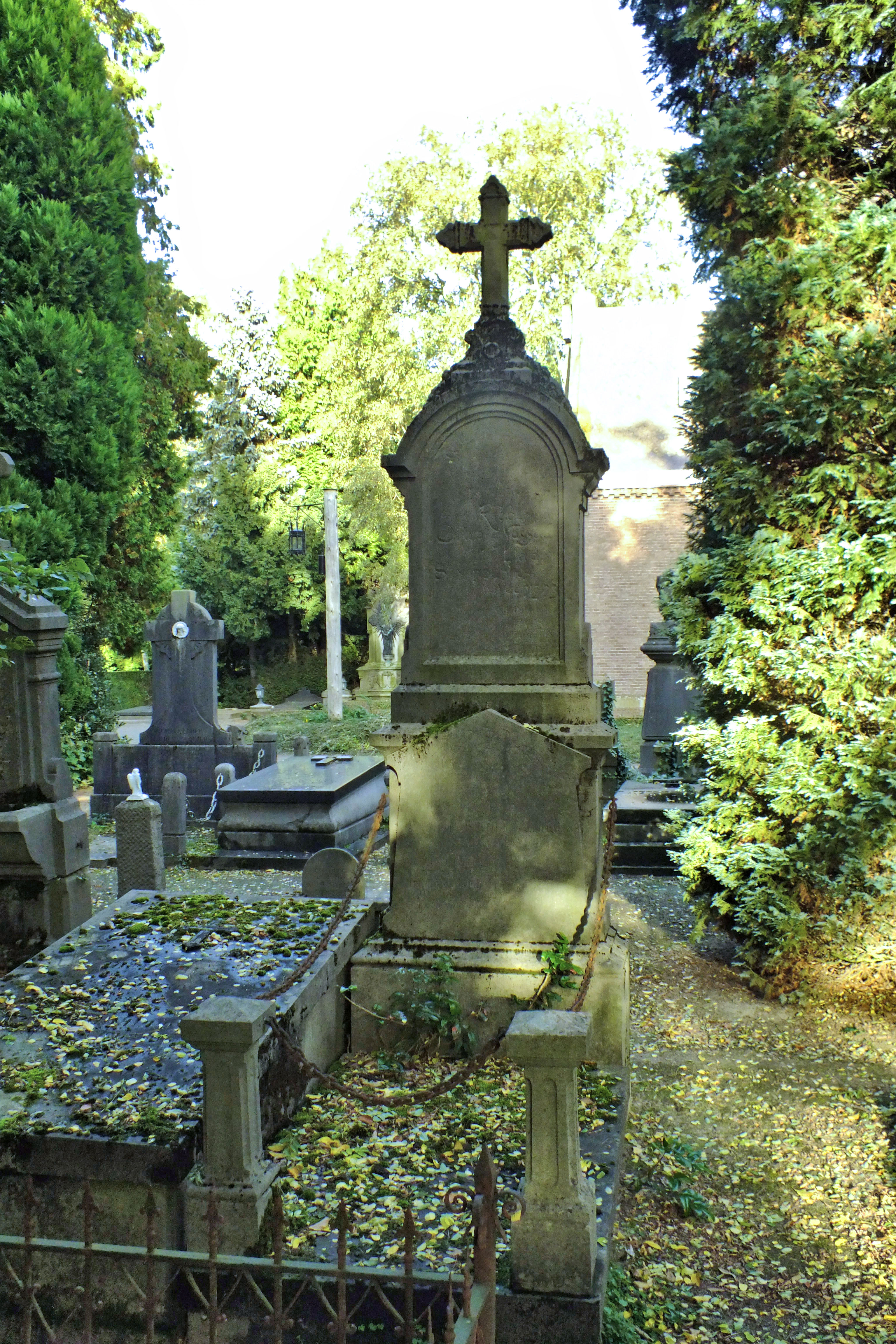 Grafmonument Willem Deckers Den Bosch